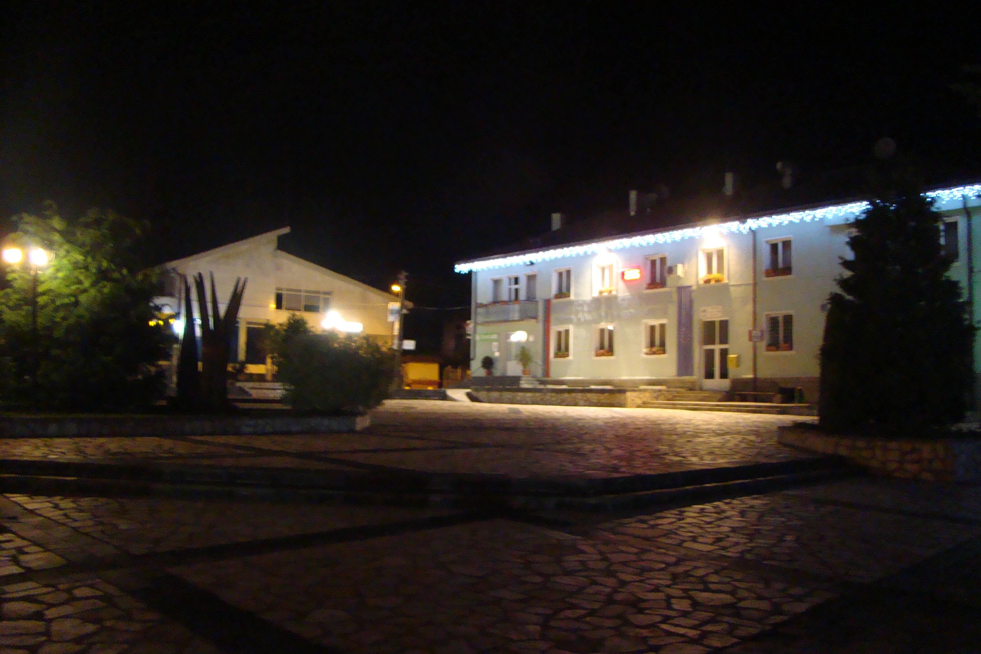 Център Добринище